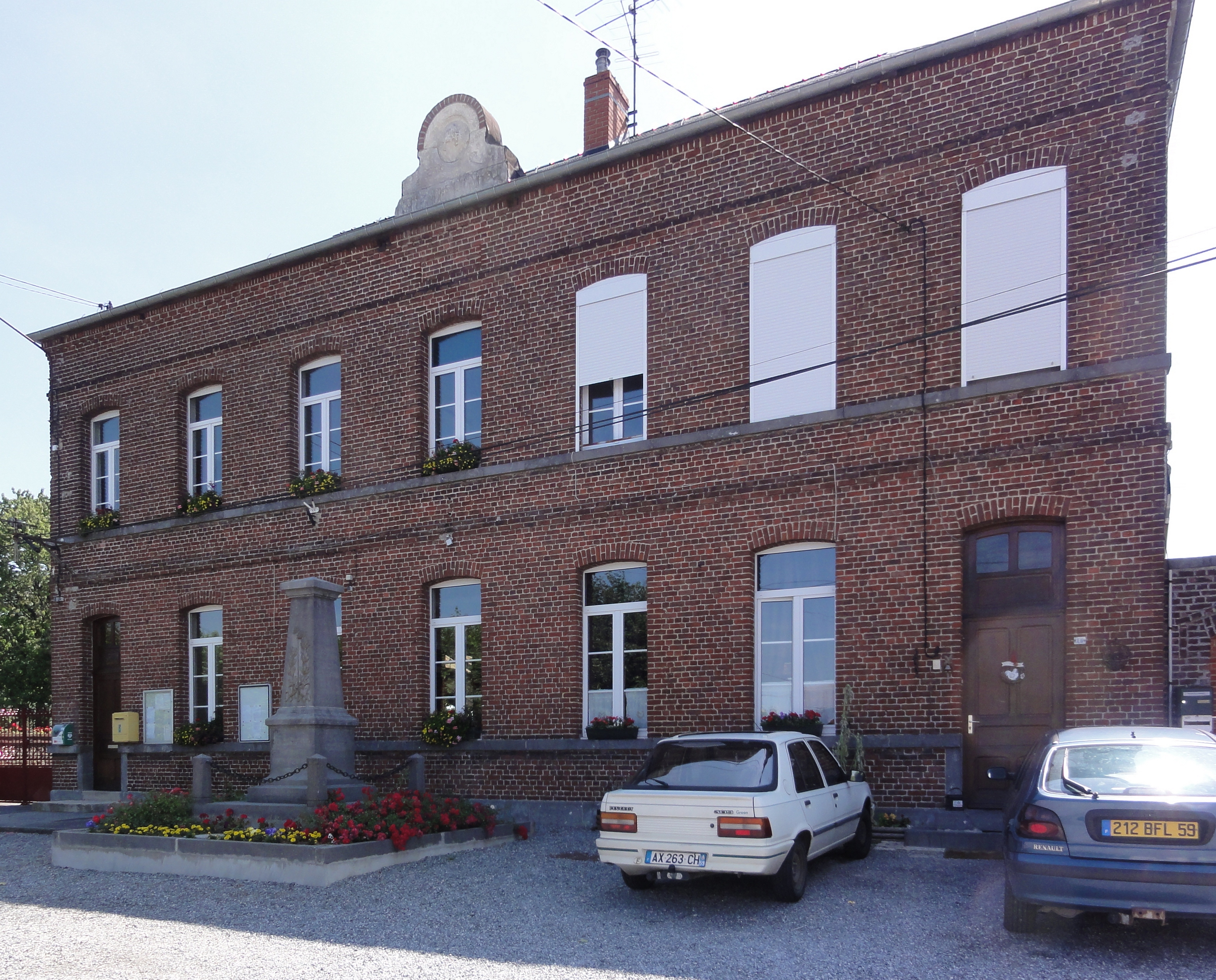 Bas-Lieu (Nord, Fr) mairie